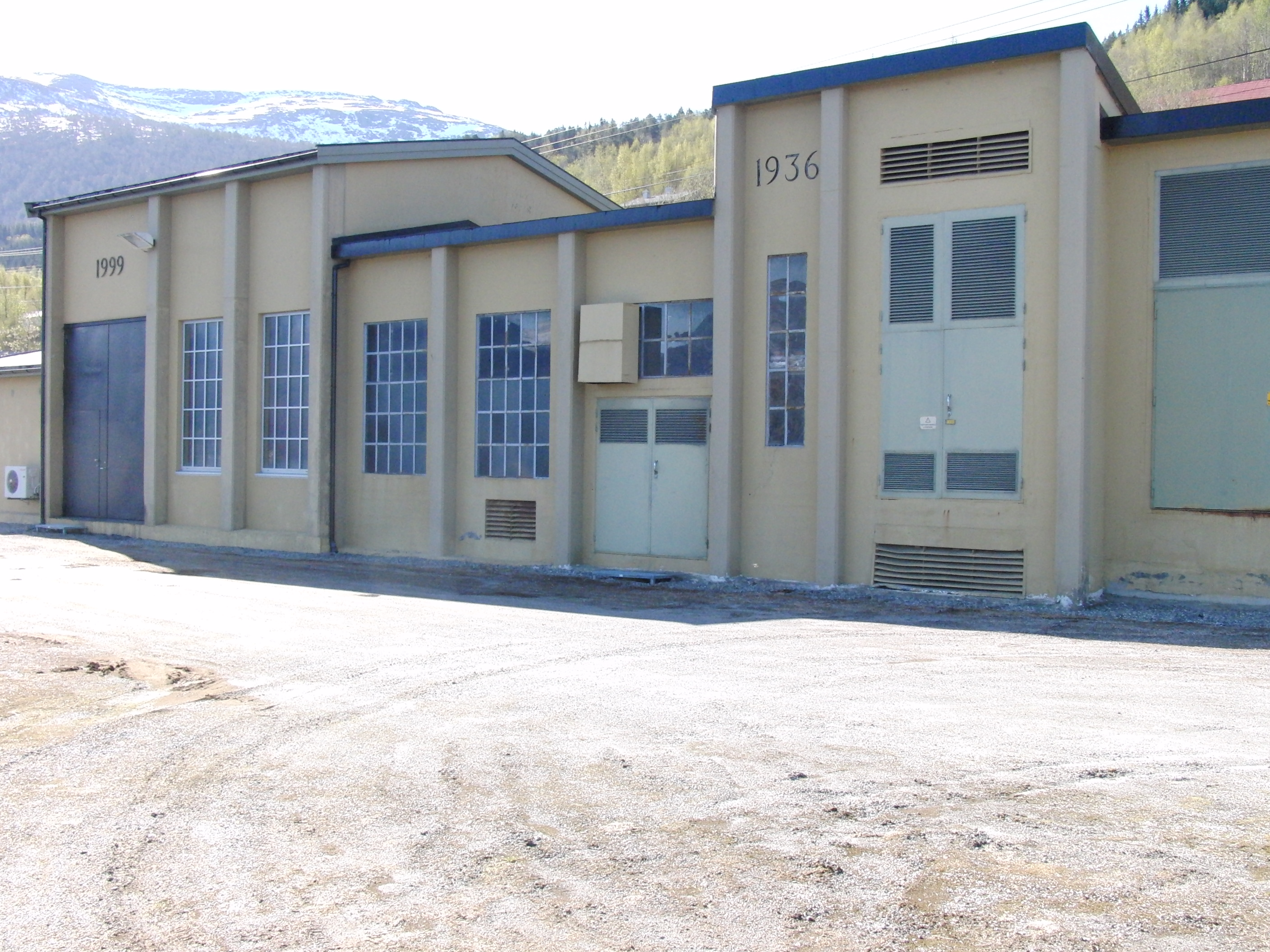 Meisal kraftverk